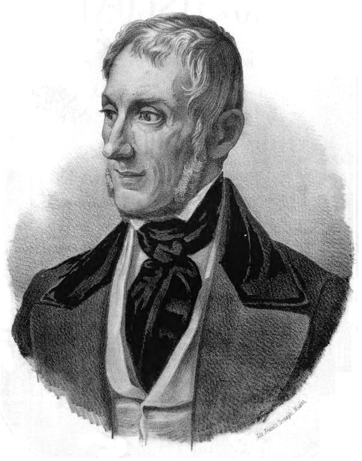 Ritratto di Tommaso Grossi posto all'inizio del volume delle sue opere